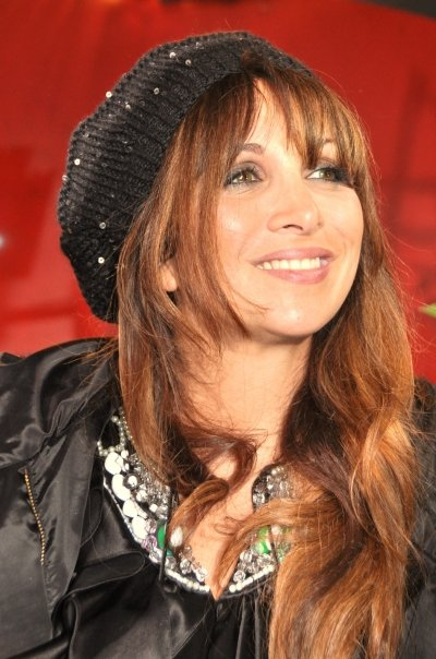 Hélène Ségara au défilé Christophe Guillarme.